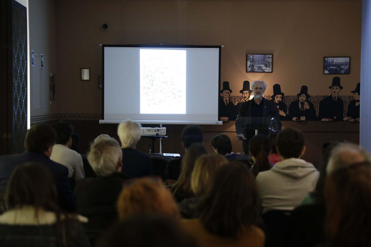 El pintor e ilustrador Carlos Sánchez Pérez, más conocido por su nombre artístico, Ceesepe, está desde hoy un poco más cerca de Madrid, la ciudad en la que nació, se inspiró y realizó la mayor parte de su obra. Una pieza virtual que permite recorrer el que fuera el estudio-taller del artista en la calle Mayor se ha presentado esta mañana en el Museo de Arte Contemporáneo y lo hecho para quedarse, porque pasará a formar parte de la exposición permanente del museo. Su presencia viene, además, a enriquecer una de las señas de identidad de este centro: el despacho de Ramón Gómez de la Serna, un escritor cuya obra también está muy vinculada a Madrid.